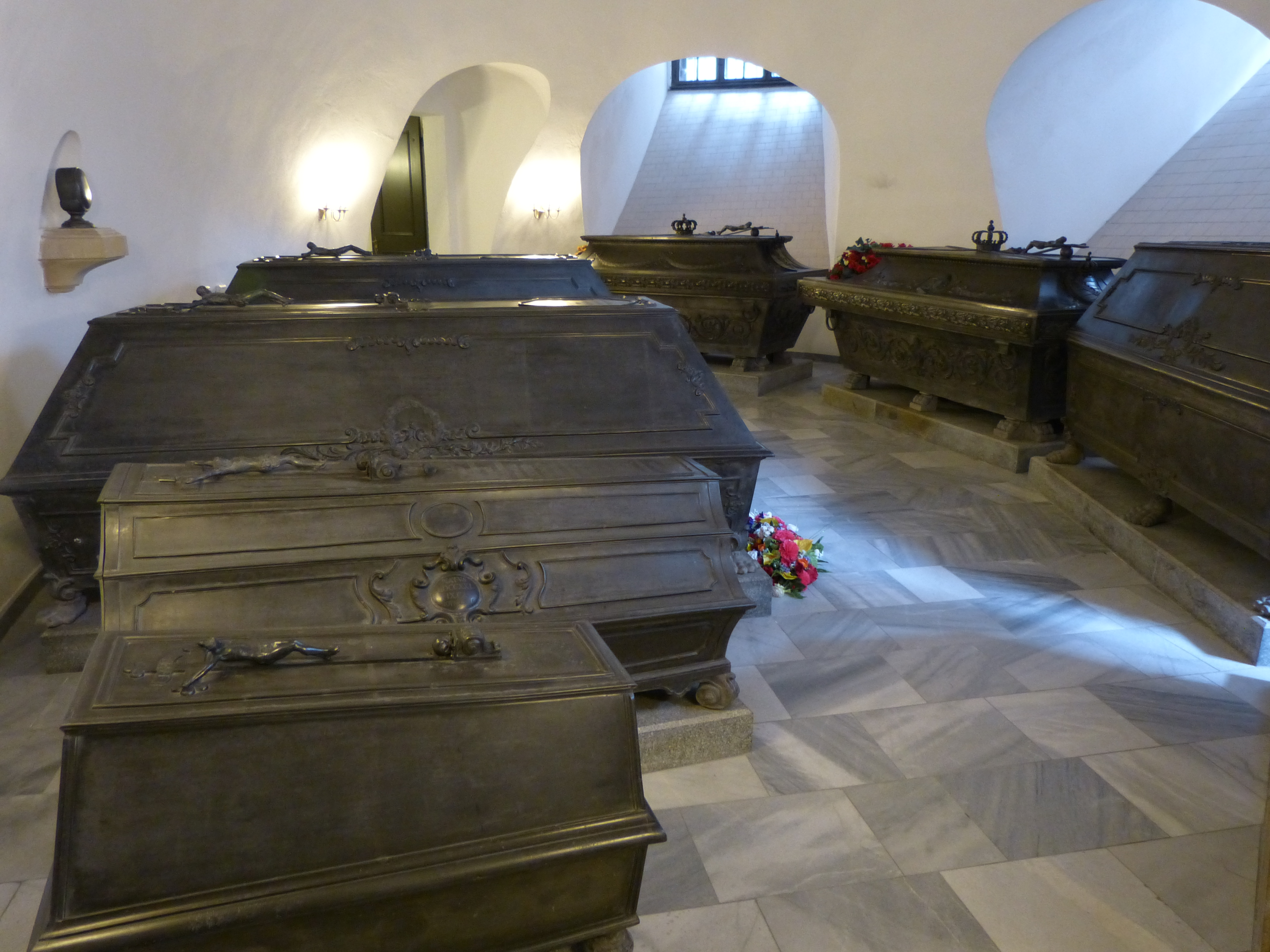 Stiftergruft der Wettiner-Gruft der Katholischen Hofkirche in Dresden, Sachsen